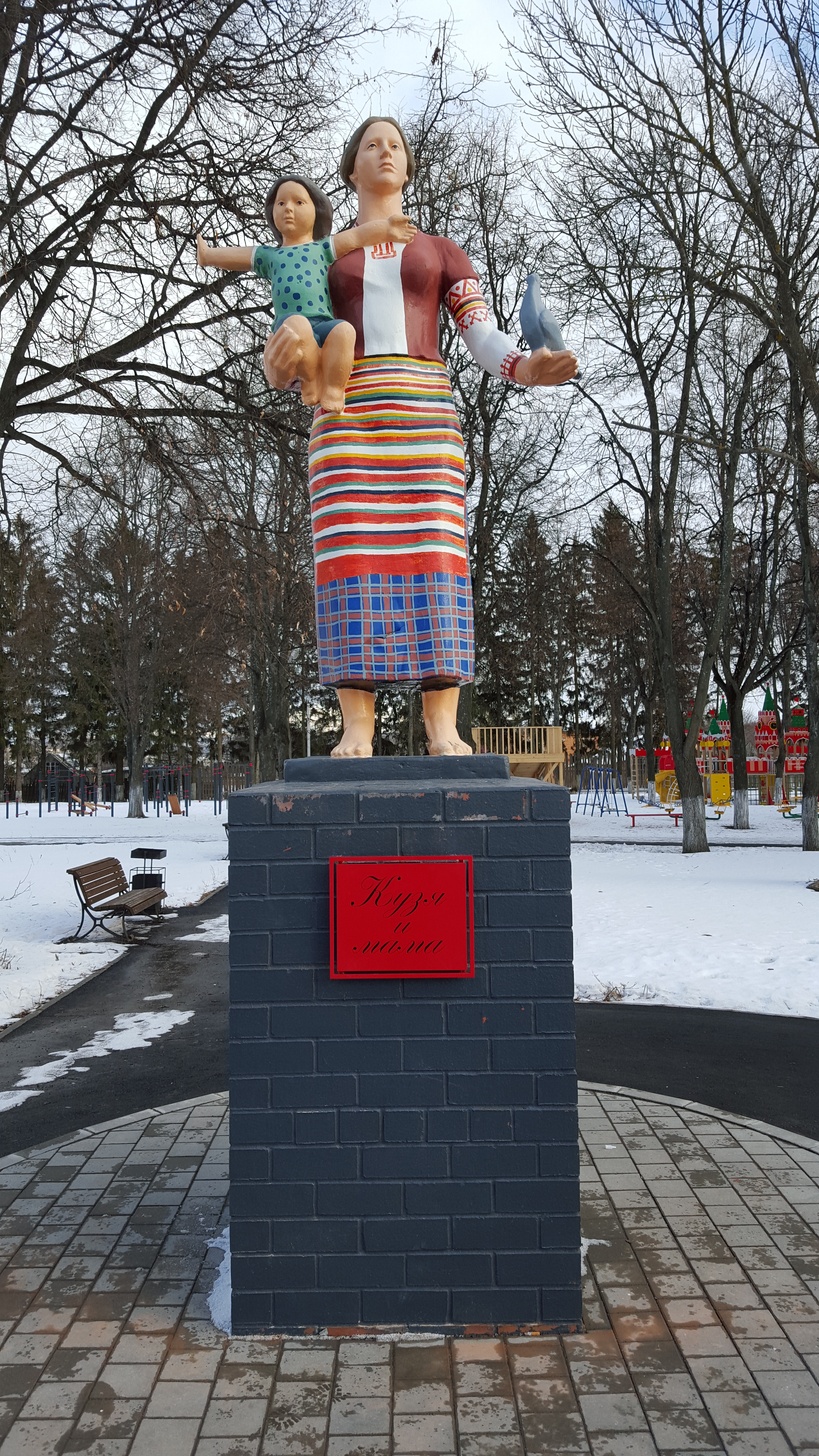 Скульптура Кузькиной матери в Одоеве